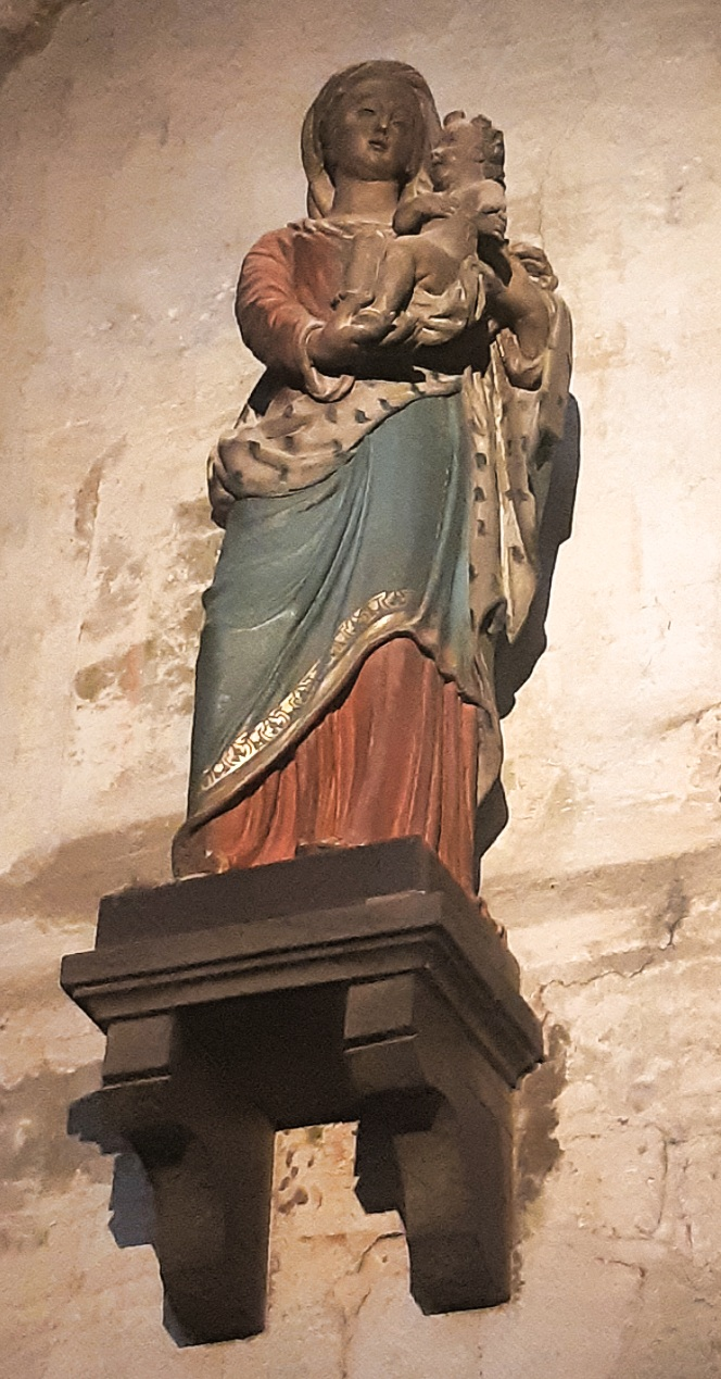 Statue de la Vierge à l'Enfant, originellement du Pont Joubert, à l'église Sainte-Radegonde de Poitiers